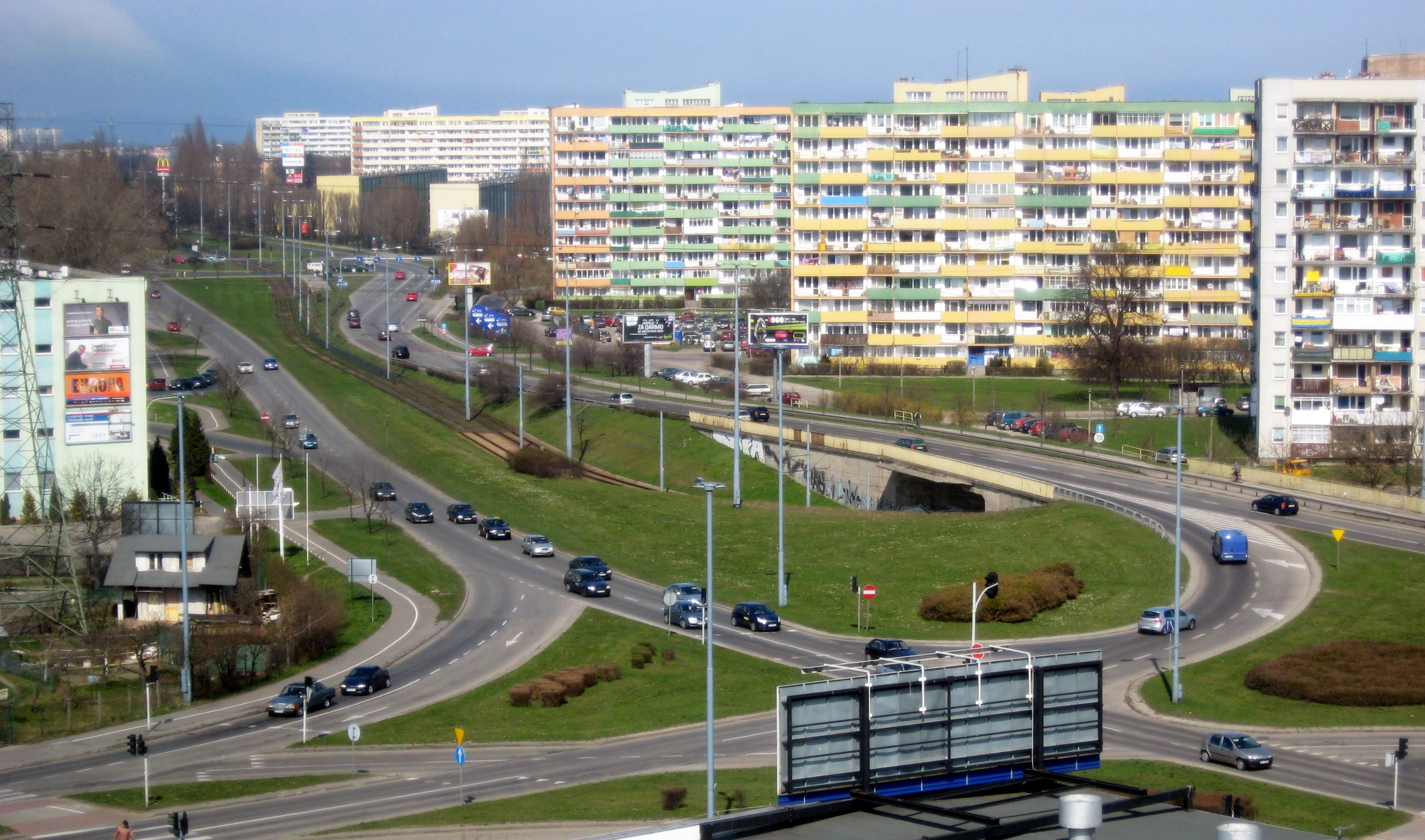 Gdańsk: aleja Rzeczypospolitej, widok od ul. Startowej, skrzyżowanie z ulicą Hynka. Granica dzielnic Zaspa i Przymorze Wielkie.